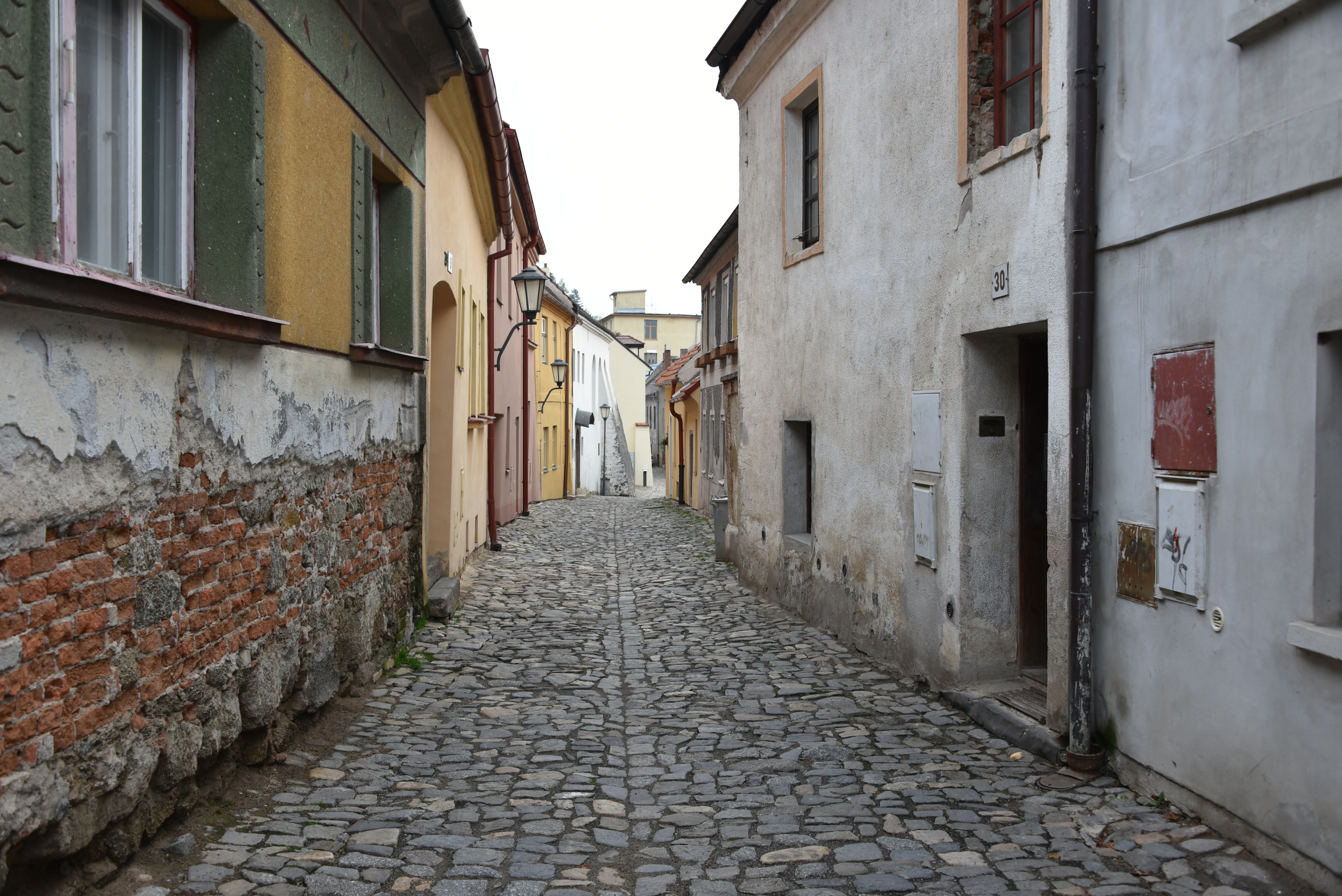 Trebice - Weltkulturerbe